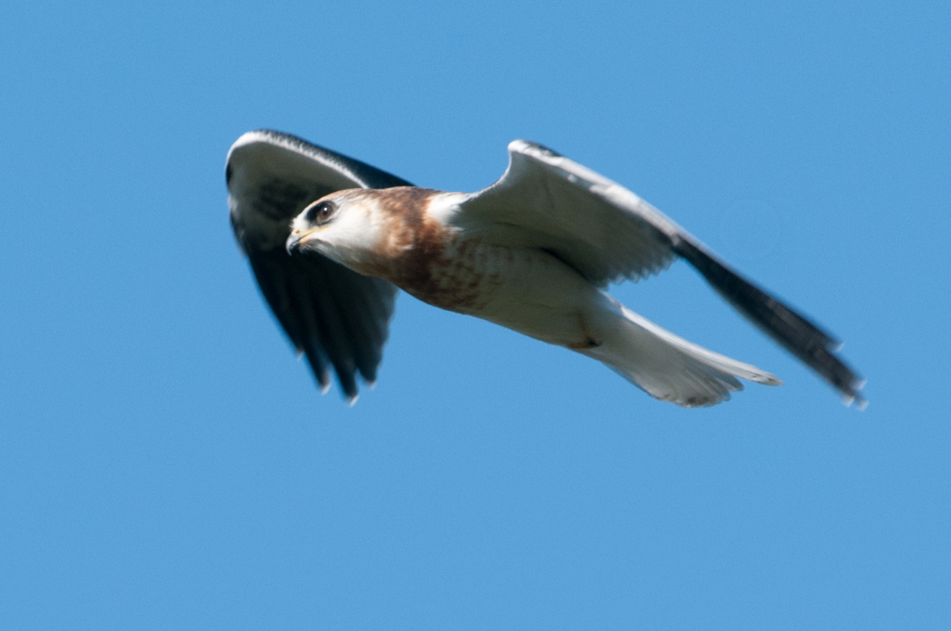 White-tailed Kite Elanus leucurus, juvenile.